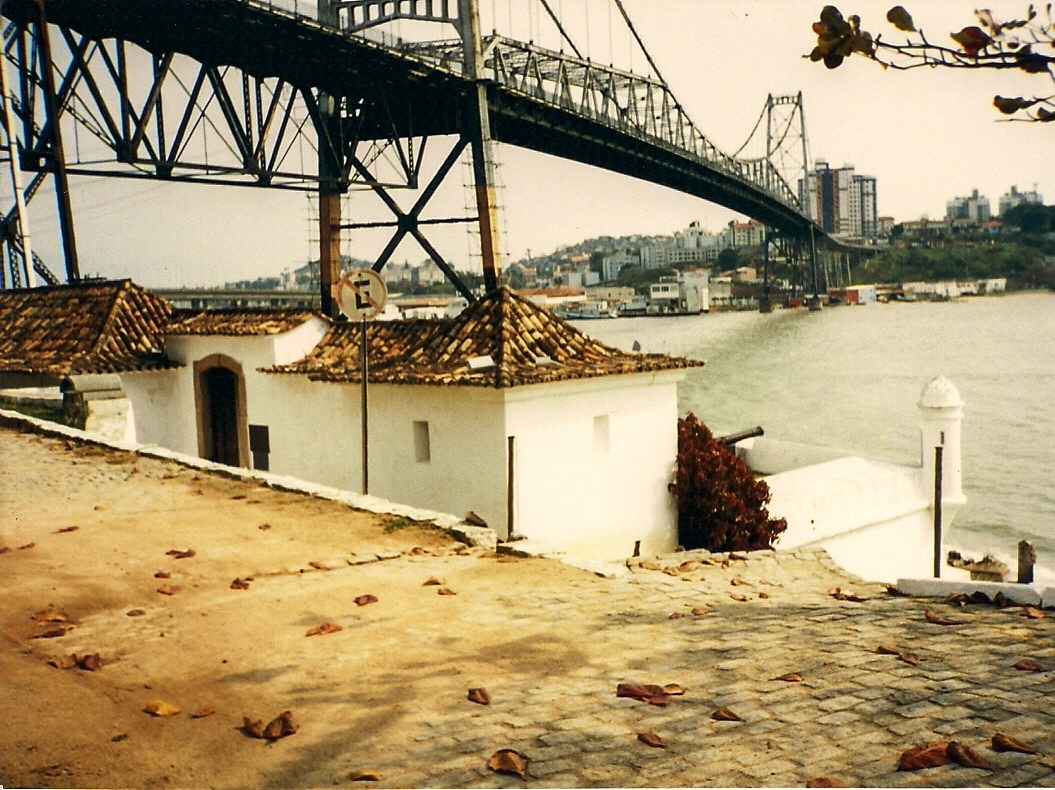 Forte de Santana, Florianópolis, Brasil.